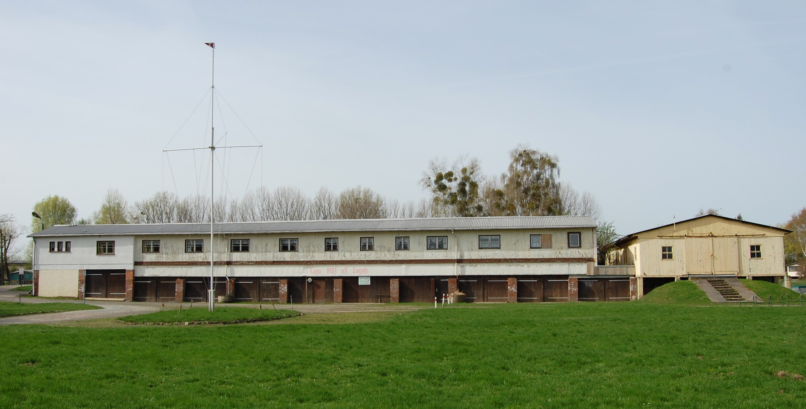 Prahm im Hafen Fermersleben, Elbseite